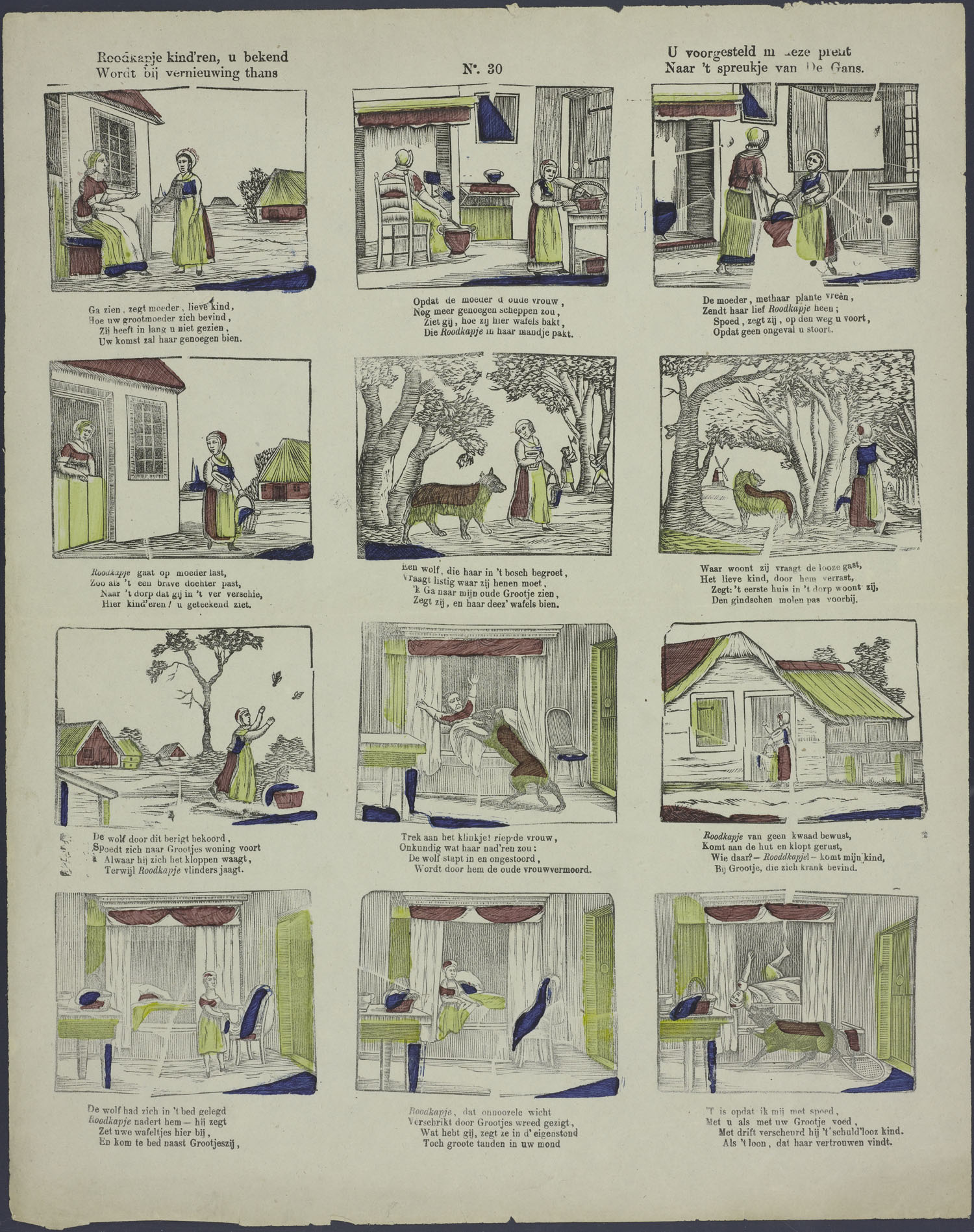 Centsprent met 4 x 3 houtsneden. Roodkapje wordt met een mand wafels naar grootmoeder gestuurd, in het bos ontmoet ze de wolf, die naar het huis van grootmoeder gaat terwijl Roodkapje vlinders jaagt. De wolf vermoordt de oude vrouw, en gaat in haar bed liggen. Roodkapje komt, kleedt zich uit en gaat naast hem liggen. De wolf verscheurt haar. Bevat vierregelige rijmende onderschriften. Zie Glenisson 30.